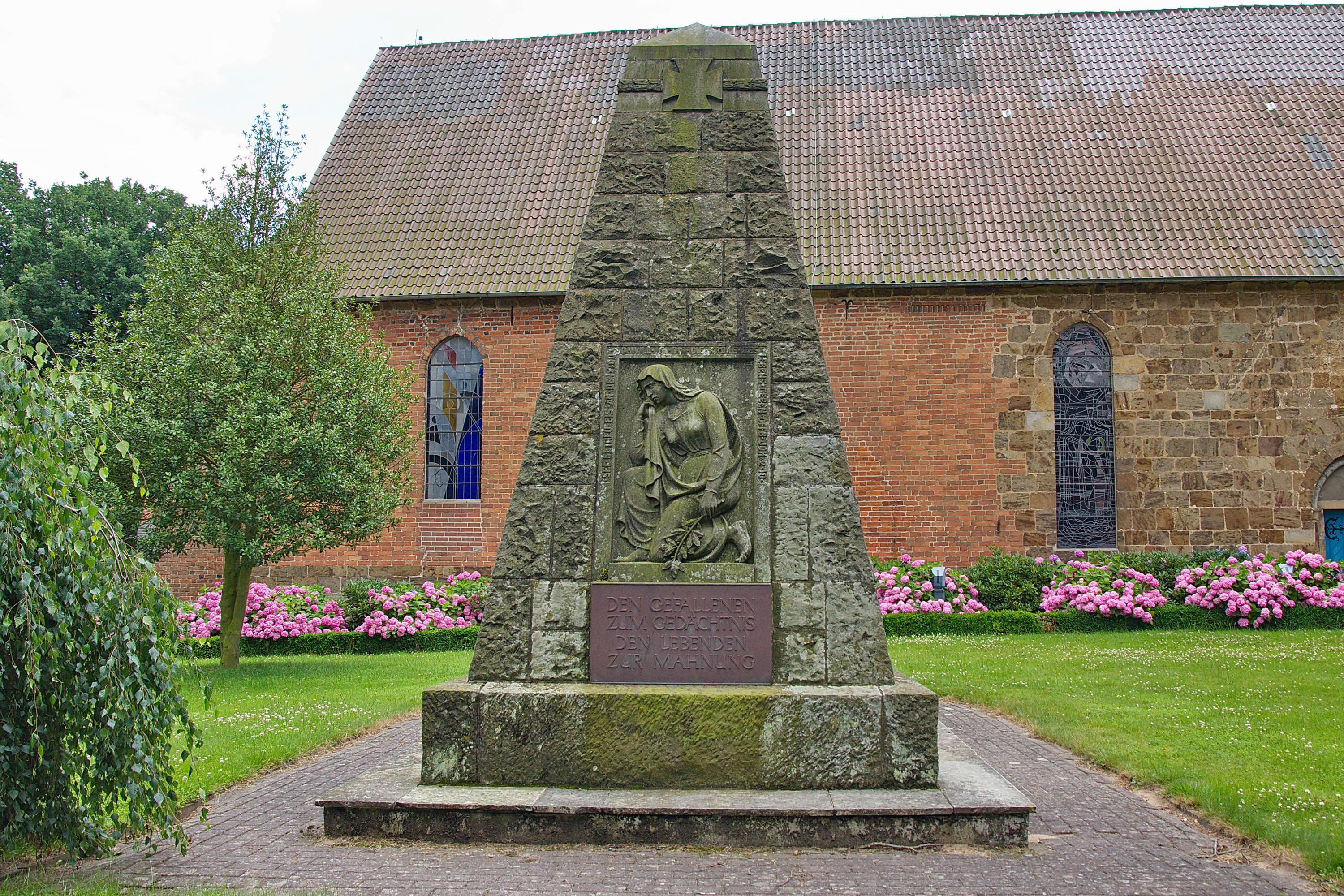 Kriegerdenkmal vor der St. Cosmae und Damiani-Kirche in Dörverden, Niedersachsen, Deutschland.